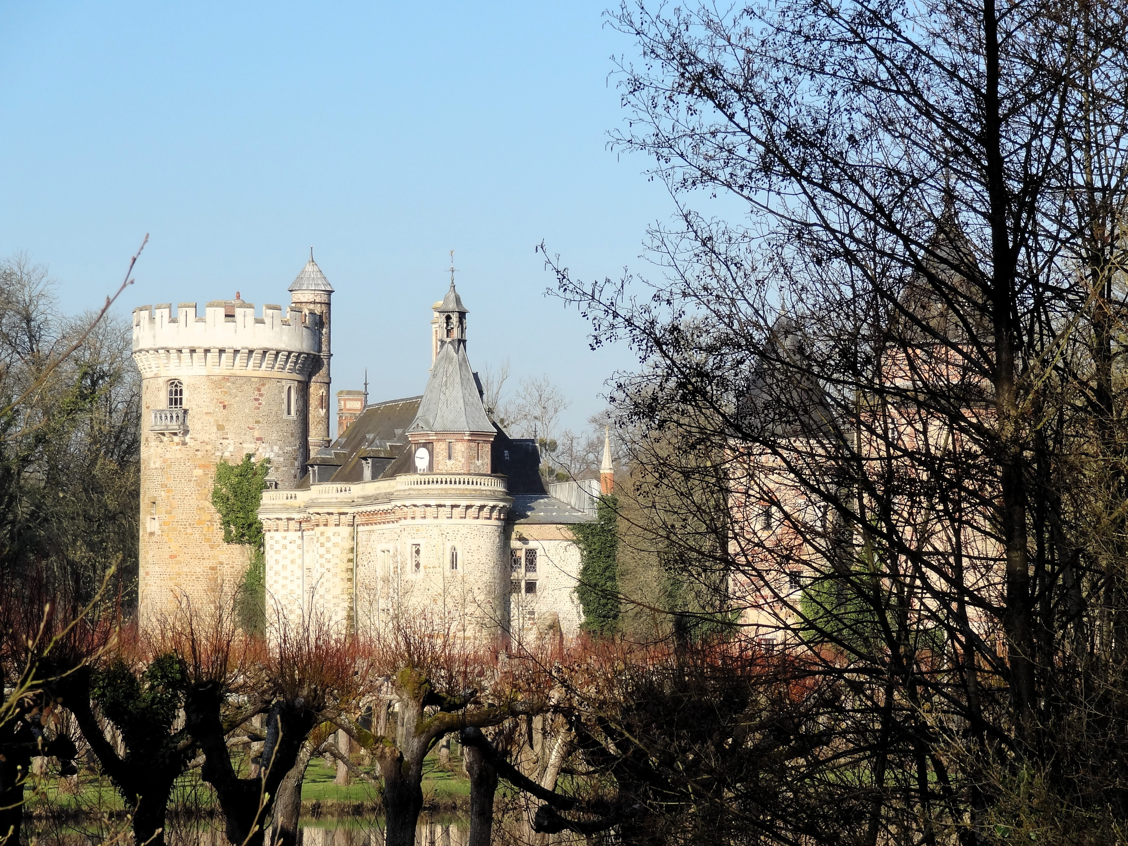 Vieux château de Condé-sur-Iton, vu depuis la route.